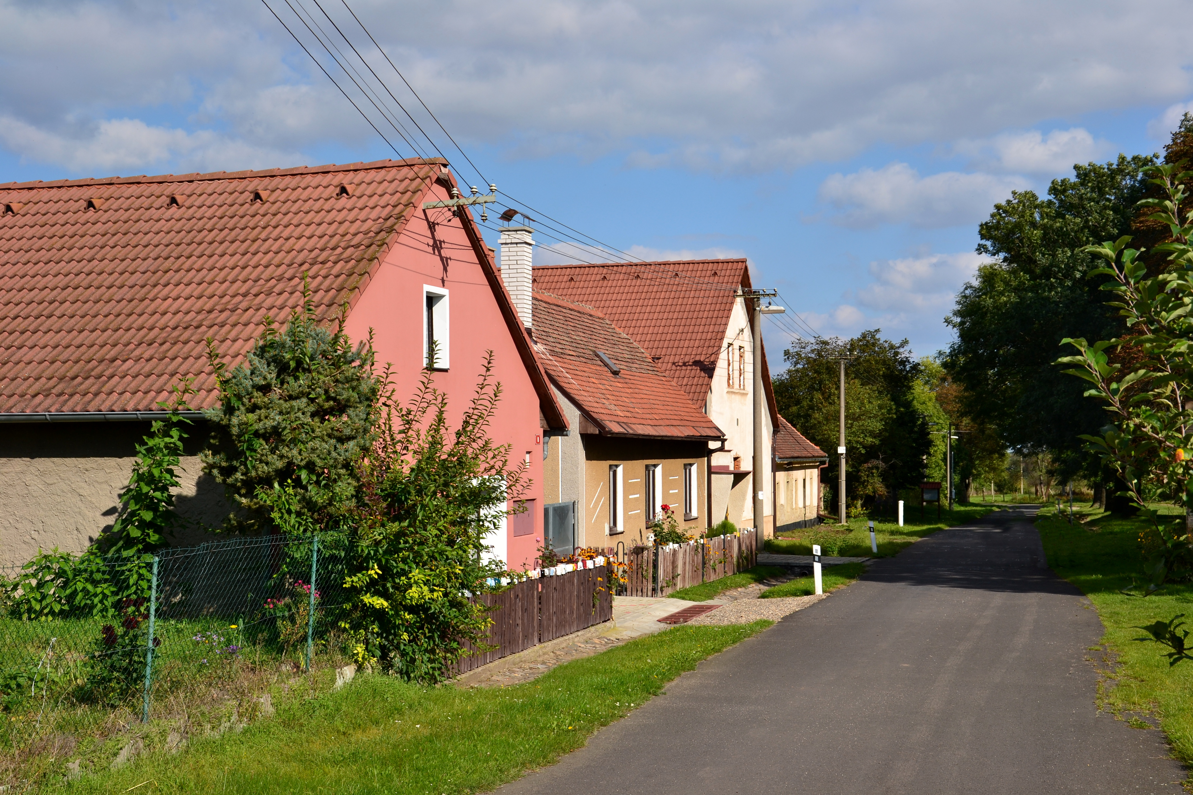 Přeskaky